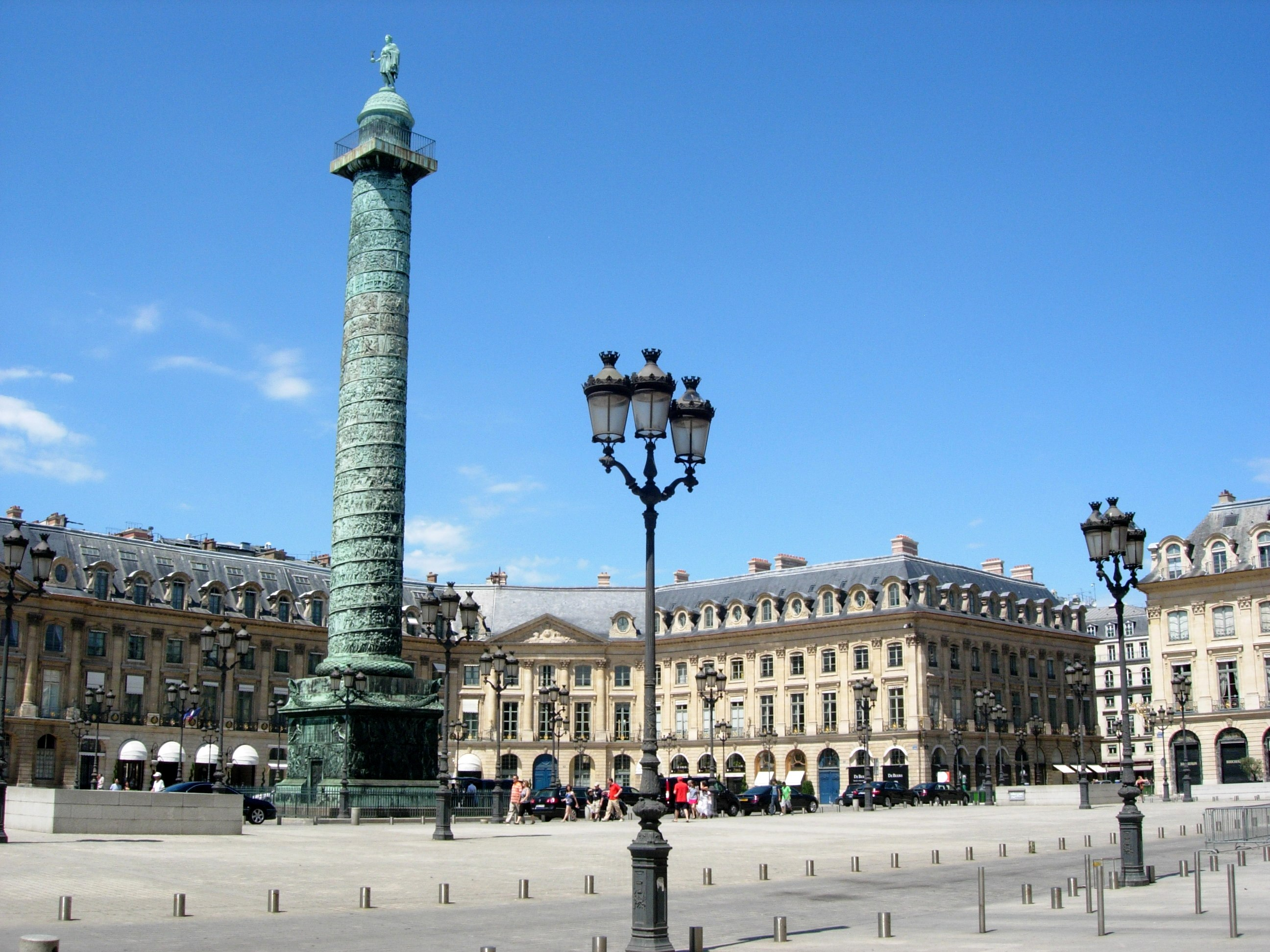 Place Vendome